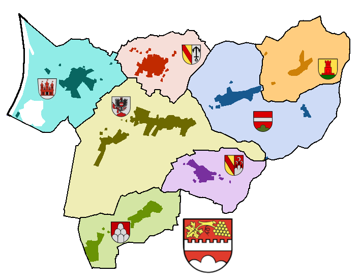 Karte von Vogtsburg im Kaiserstuhl in Südbaden, Deutschland. nur mit Wappen für die einzelnen Ortsteile, sonst unbeschriftet. Die Wappen sind aus koeiert. Bildnachweise finden sich dort unter dem jeweiligen Wappen.